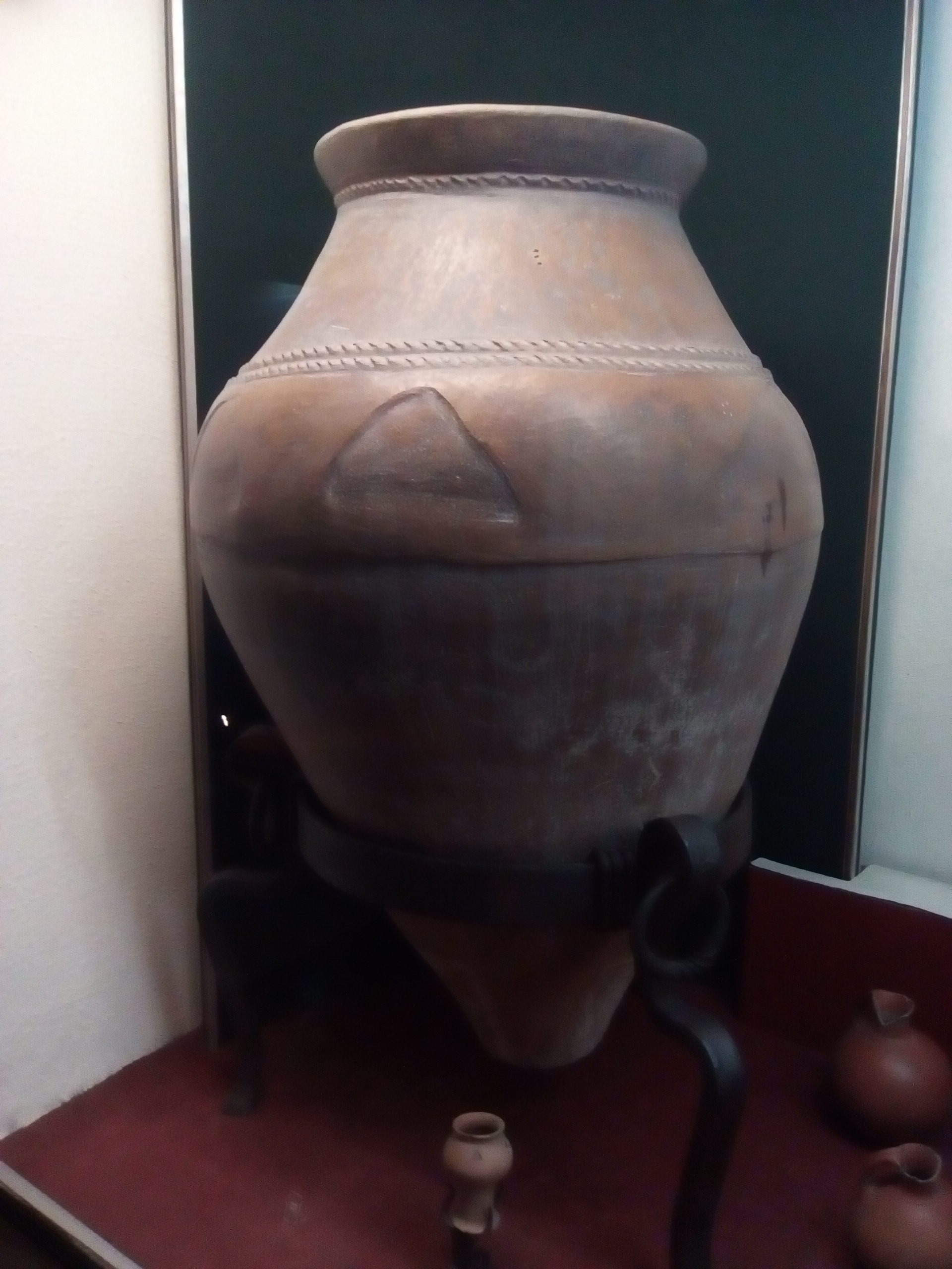 Երևանի հիմնադրման պատմության թանգարանը 5/19.3